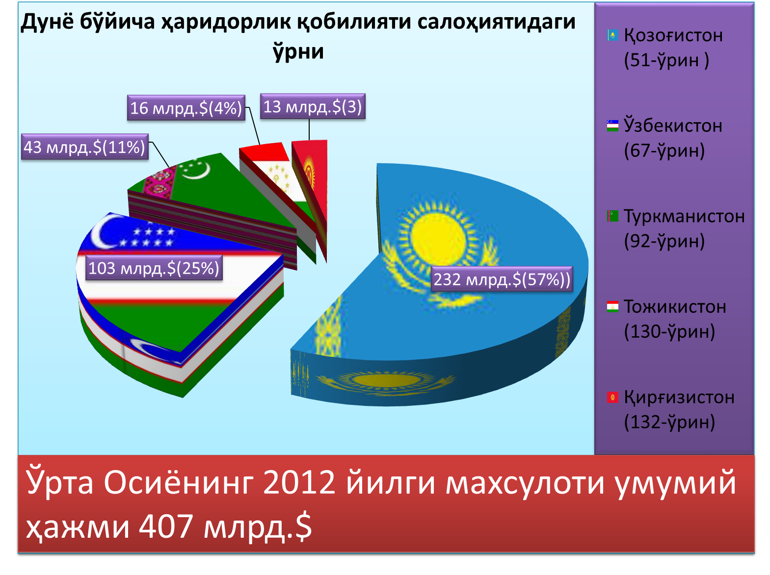 Oʻzbekcha/ўзбекча: Ўрта Осиёнинг 2012 йилги махсулоти умумий ҳажми